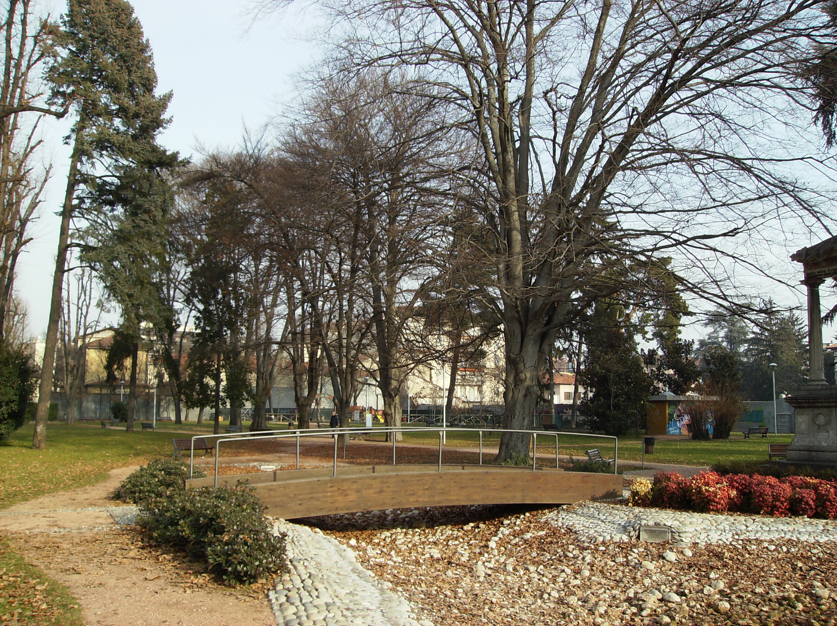 Parco Ugo Foscolo (Busto Arsizio)